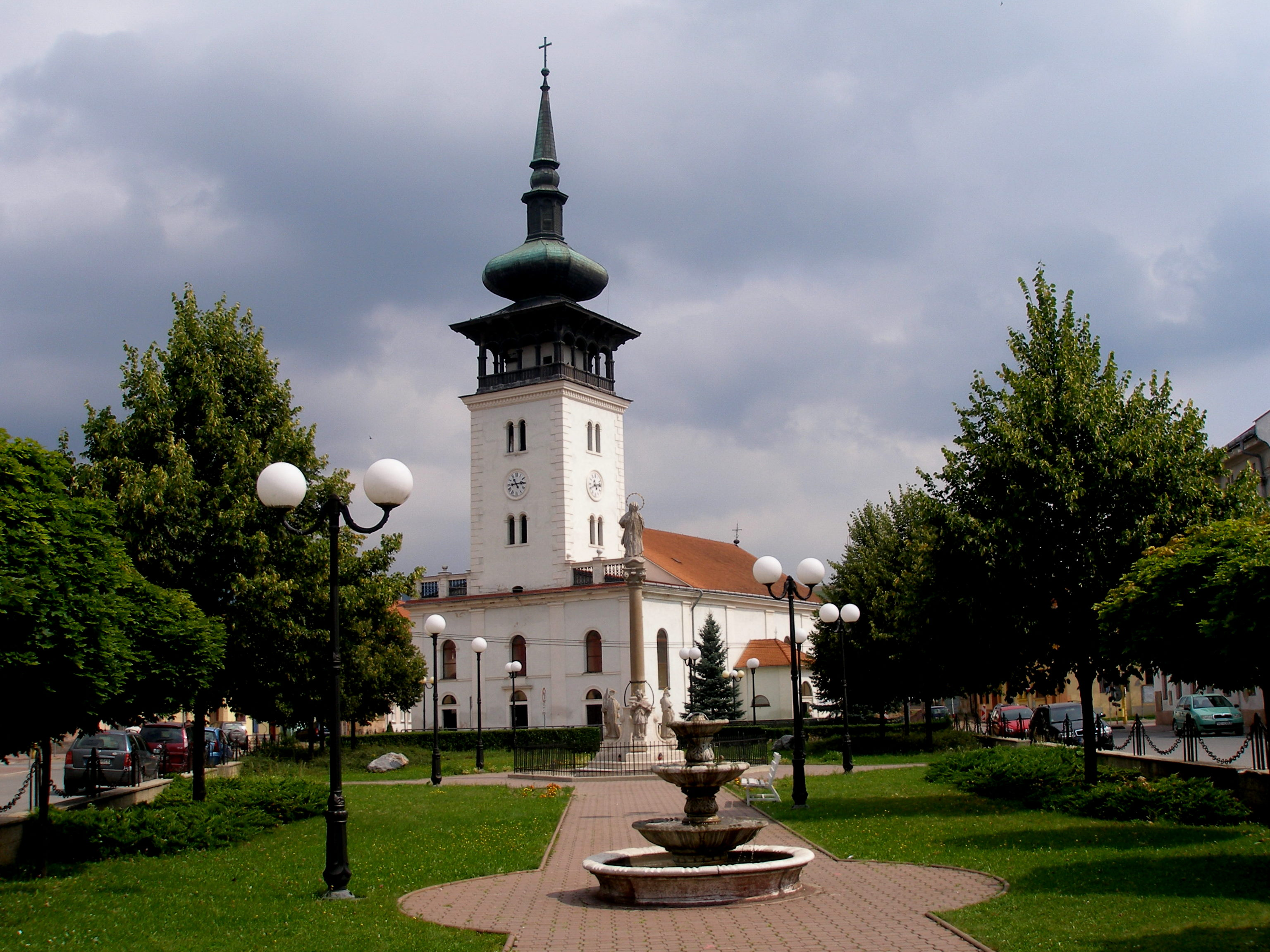 Mesto Medzev okres Košice okolie.